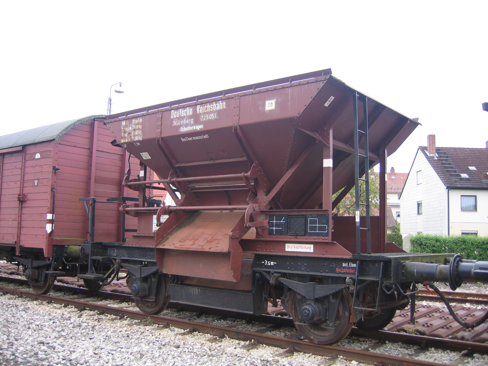 German goods wagon, Talbot hopper, at Ebermannstadt, Bavaria in 2005. Vehicle fleet of Franconia Switzerland Museum Railway (Dampfbahn Fränkische Schweiz).